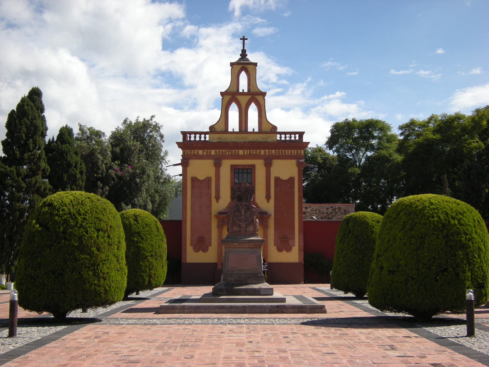 Santiago de Querétaro, México